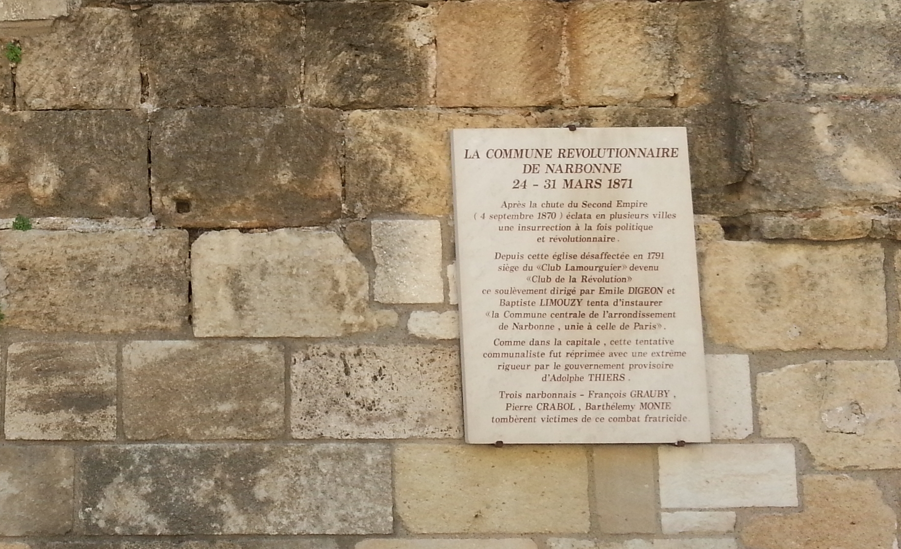 Plaque commémorative de la commune de Narbonne érigée sur le mur extérieur Sud de Notre-Dame de Lamourguier, à Narbonne